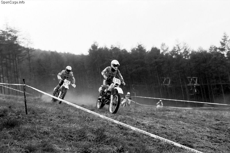 ブランシュたかやまで行われたエンデューロレース Location ブランシュたかやまスキー場